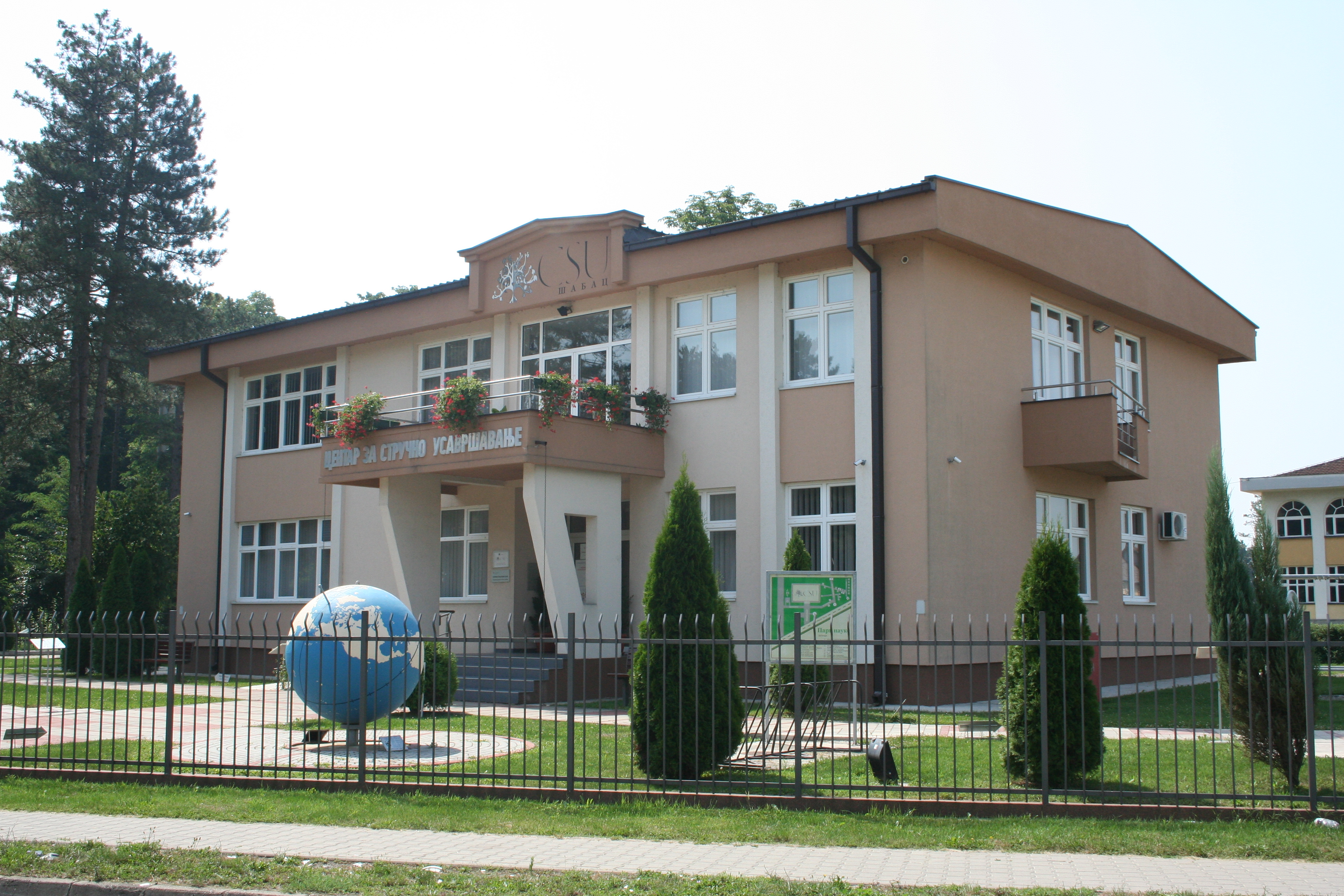 Centar za stručno usavršavanje, Šabac